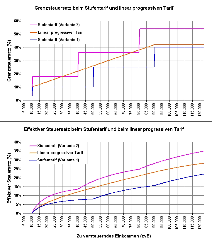 Vergleich des Verlaufs der Steuersätze von zwei Stufentarifen (blau und magenta) mit einem progressiv linearen Tarif (orange). Bei den Stufentarifen ist an den Grenzen zwischen den Tarifstufen beim effektiven Steuersatz (Durchschnittsteuersatz) eine Welligkeit zu erkennen.